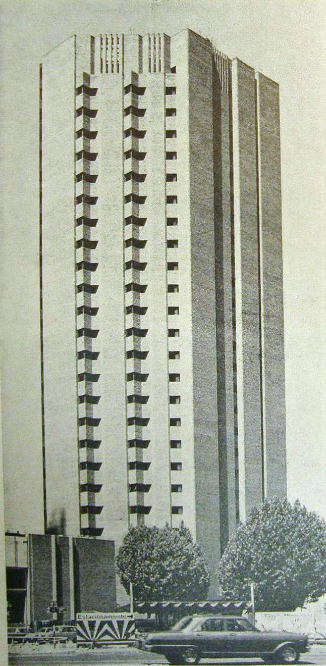 La Torre Conurban, diseñada por los arquitectos Kocourek, Katzenstein y Llorens y terminada en 1973. Se encuentra en el complejo Catalinas Norte, en el barrio de Retiro. Buenos Aires, Argentina.